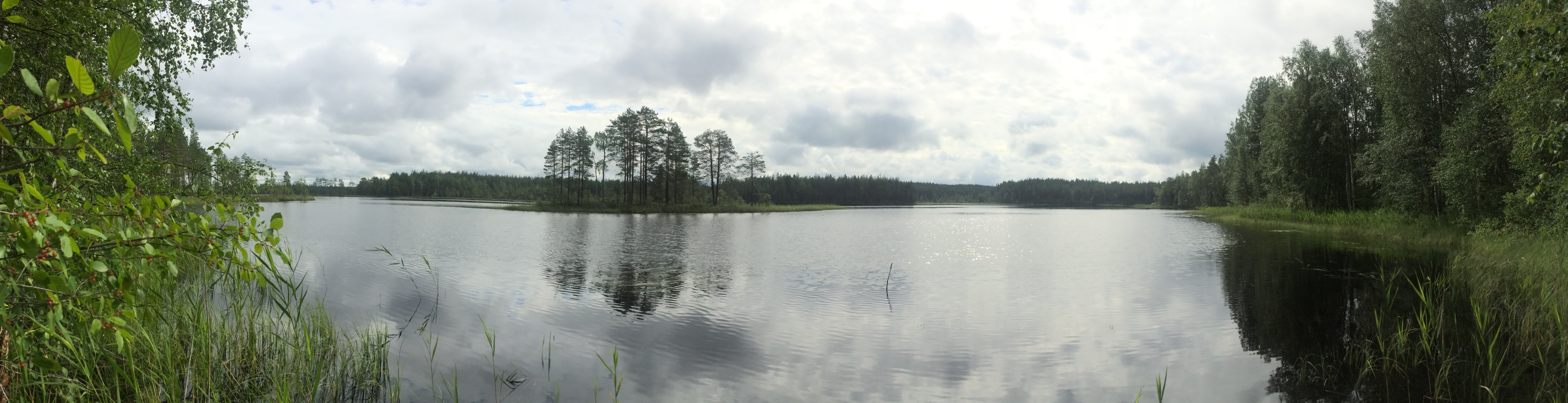 Юркинъярви